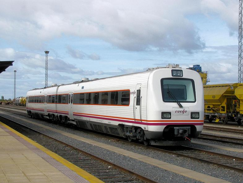 Una unidad 594 reformada en la estación de Mérida.